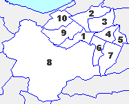 札幌市行政區劃圖 （from 日語維基，由上傳者加工增添編號） Category:北海道